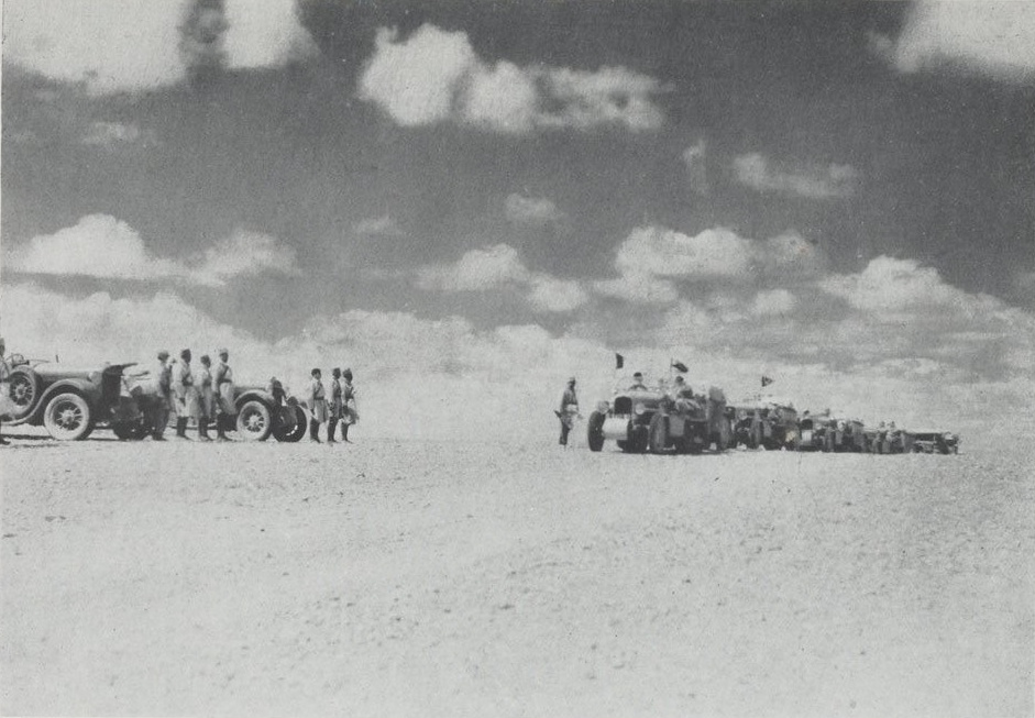 Photographie publiée dans le numéro de décembre de la revue La Géographie à l'occasion de divers compte-rendus de l'expédition. Sous-titre : Dans le desert de Syrie sur la frontière de l'Irak. Adieux des mitrailleurs français aux membres de l'expédition. Expédition Centre-Asie Citroën (1931-1932).